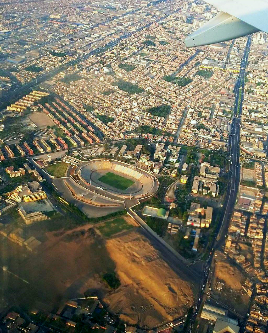 Vista aérea de la Universidad Nacional Mayor de San Marcos, Lima, Perú.